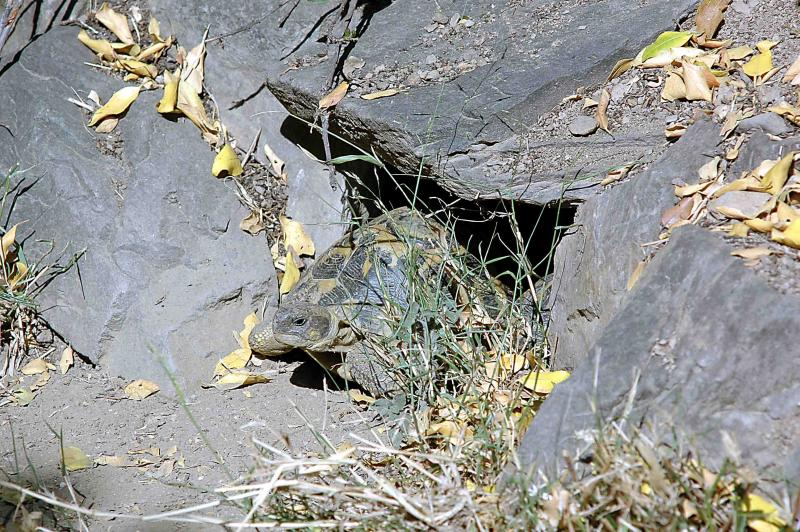 Testudo h. hermanni vor ihrem Unterschlupf im Habitat (Spanien)